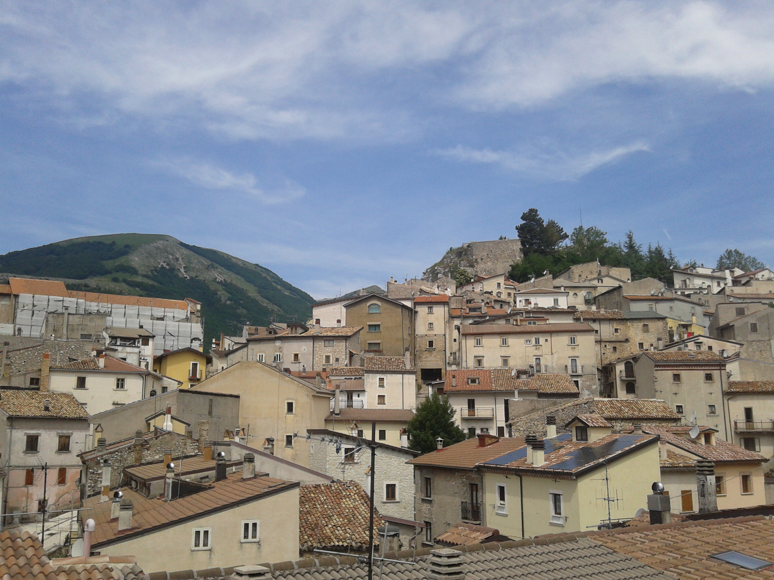 Scorcio fotografico di Ovindoli